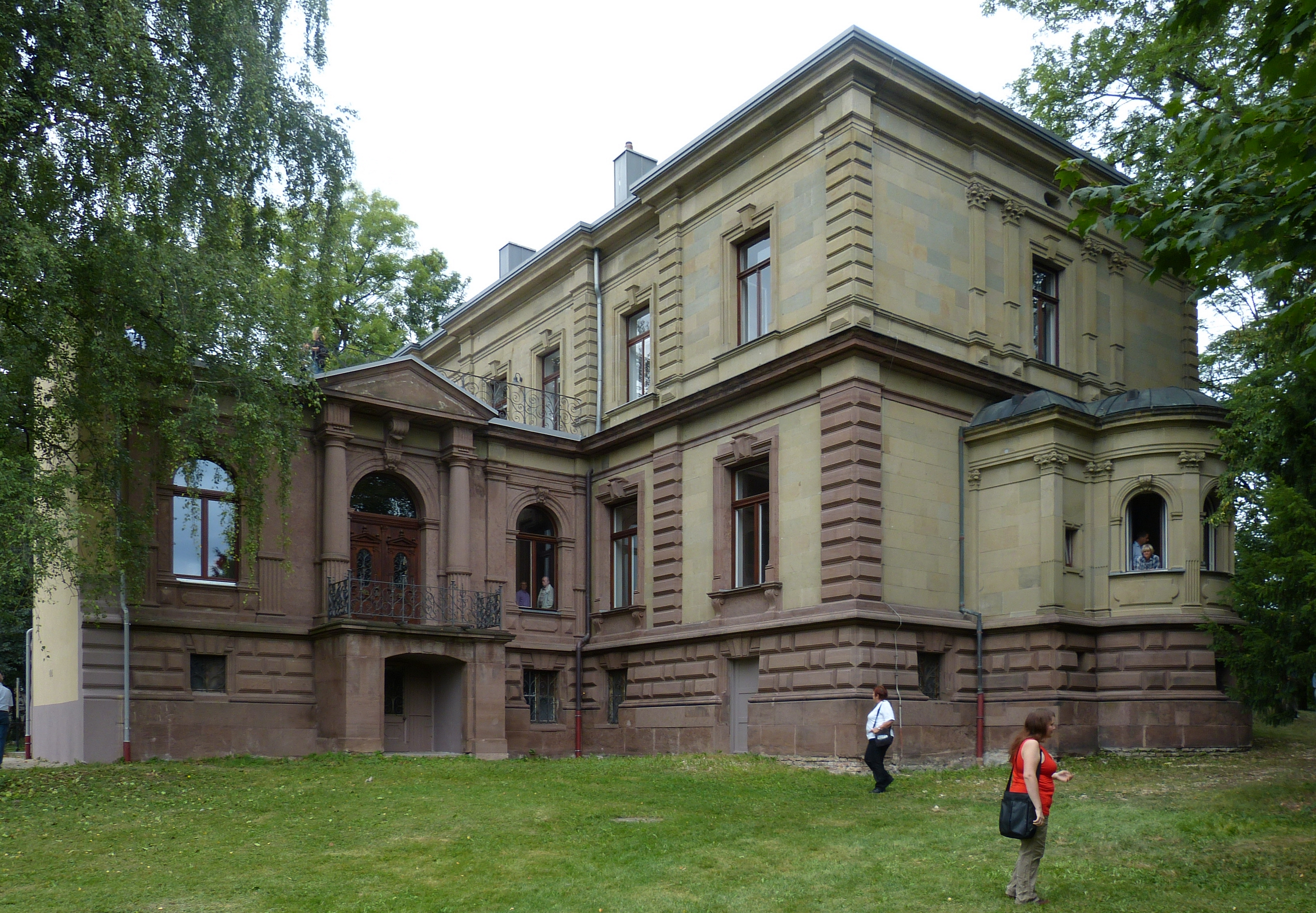 Die Villa Haag in Augsburg.